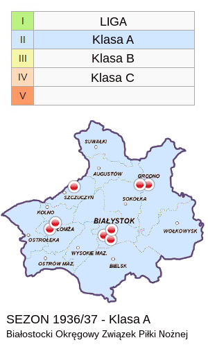 Jagiellonia w sezonie 1936/37 - mapa